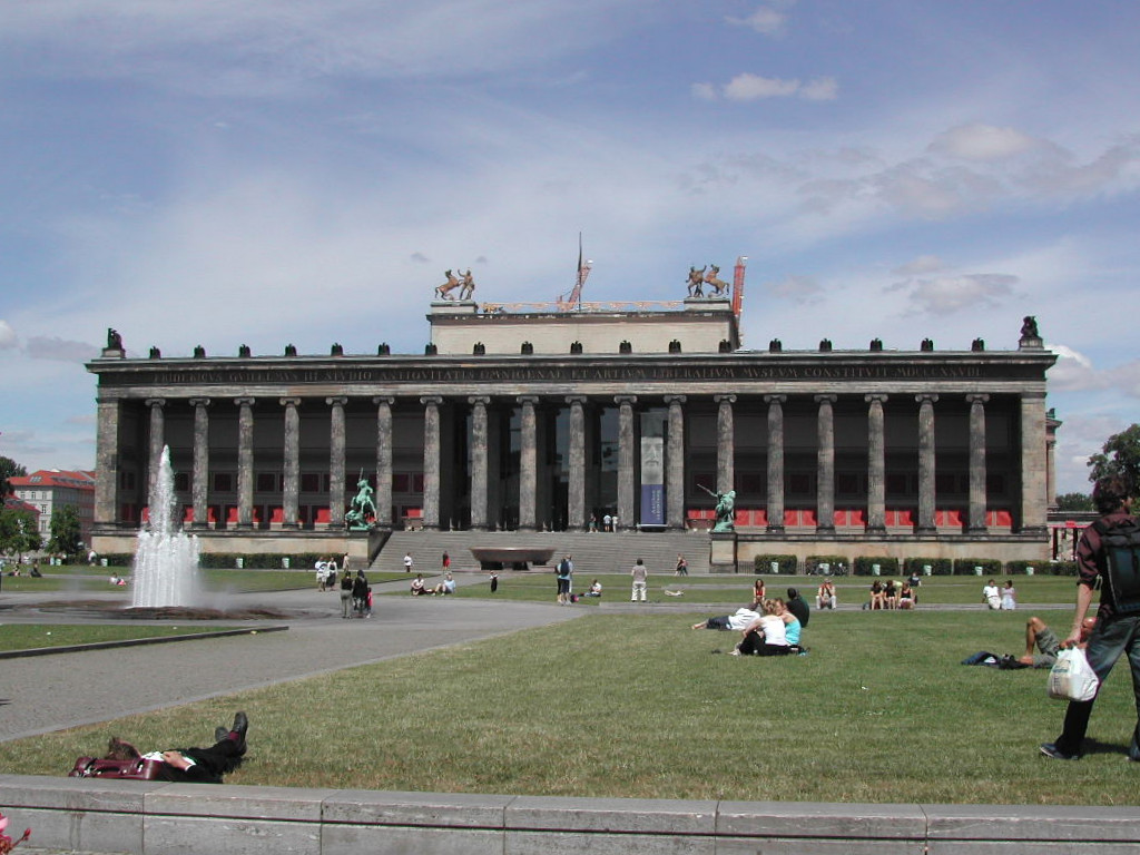 Muséeinsel (Berlin) - Aale Musée.